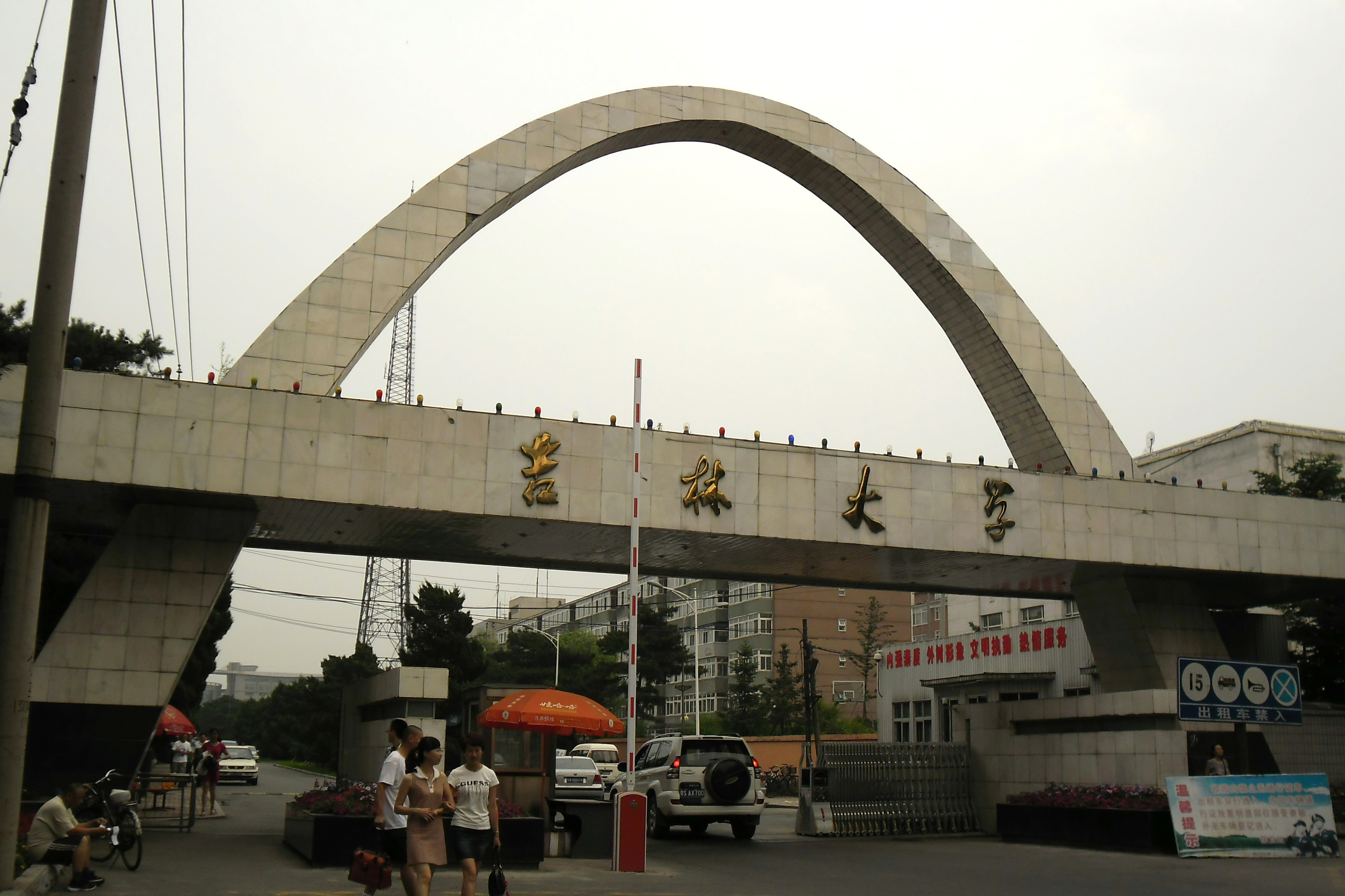 中文（中国大陆）: 吉林大学南岭校区